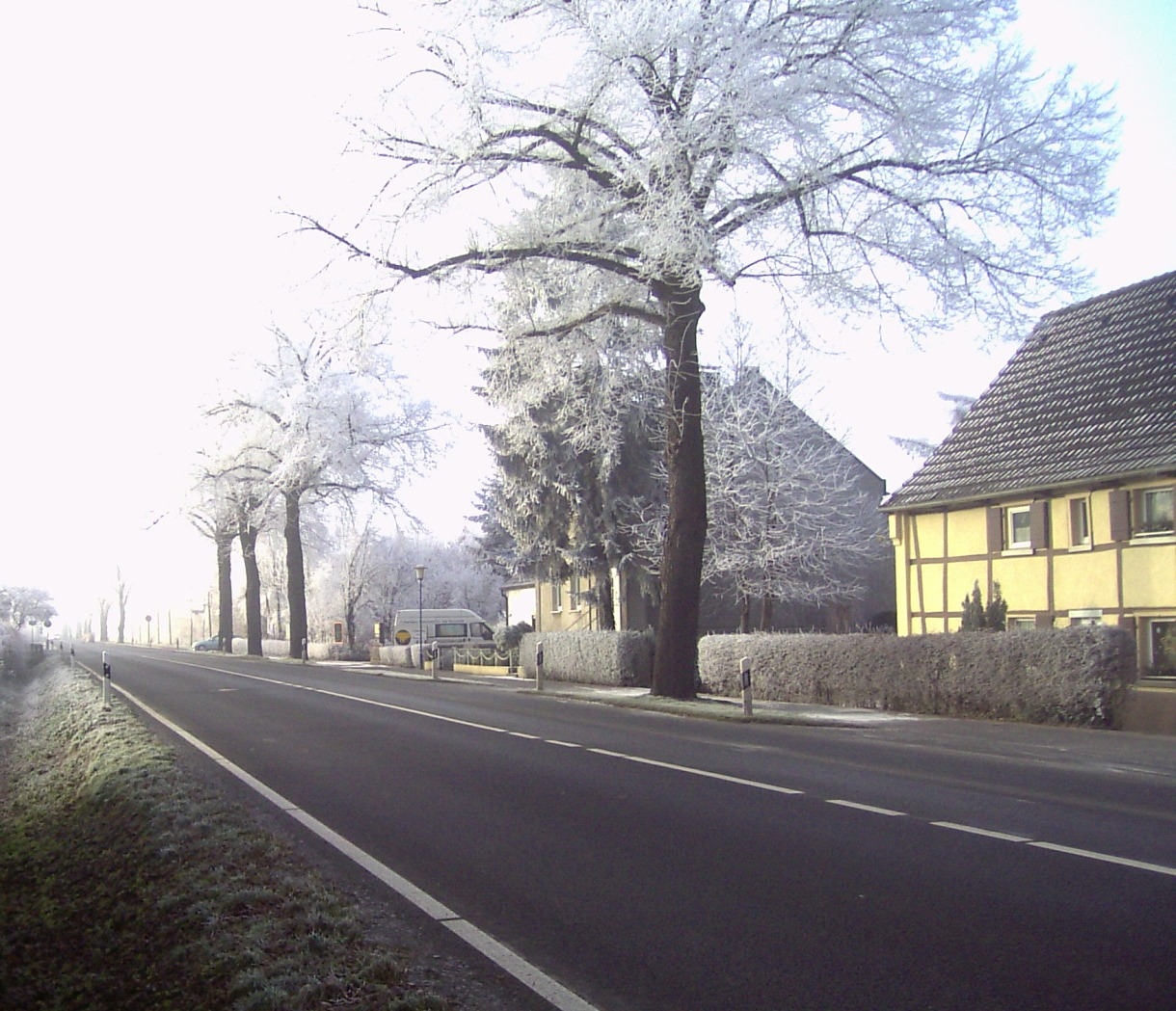 Winter Alte Heide, Hammerstraße 2007, Unna